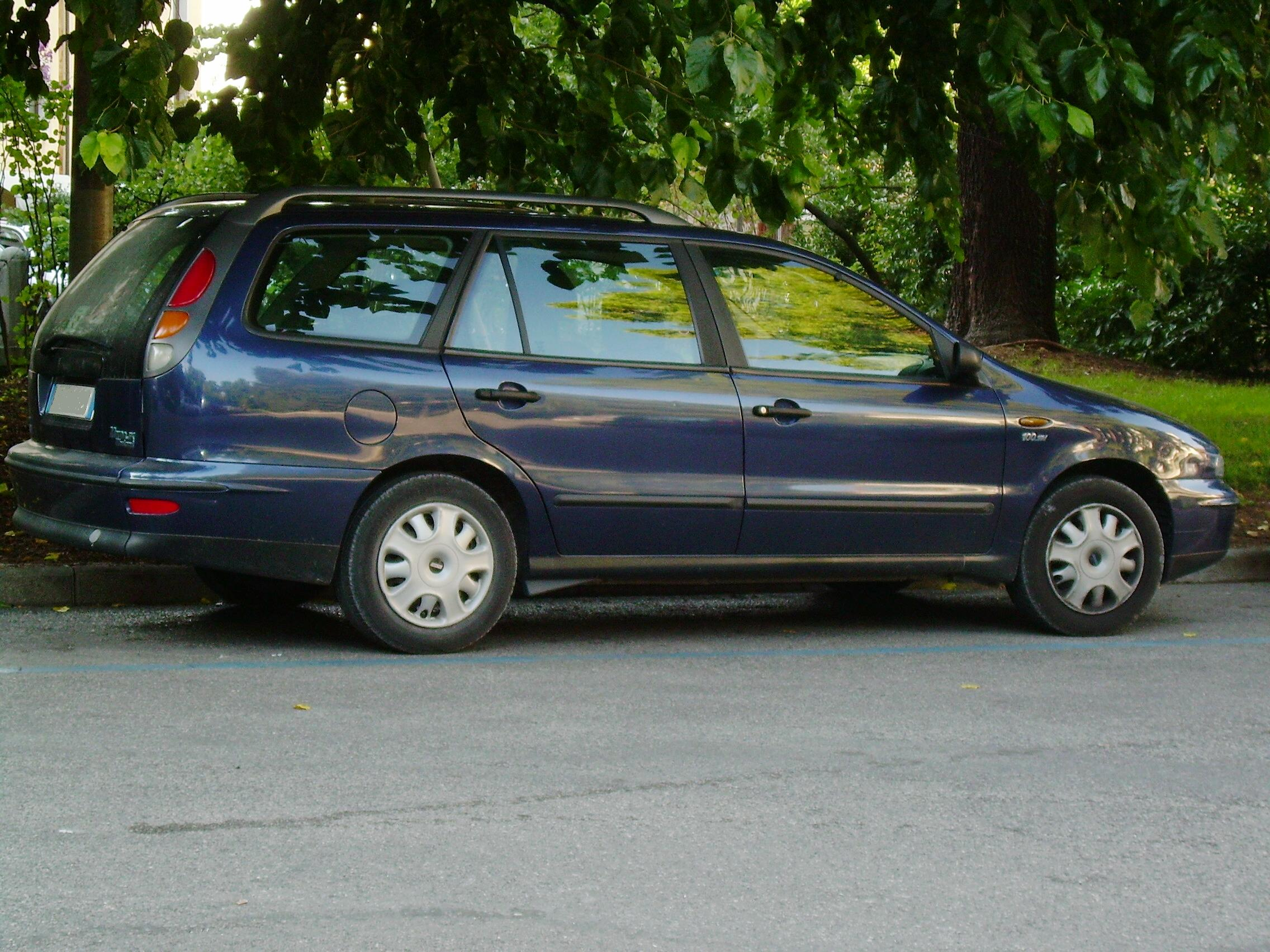 Autore: Powering Una Marea Weekend.